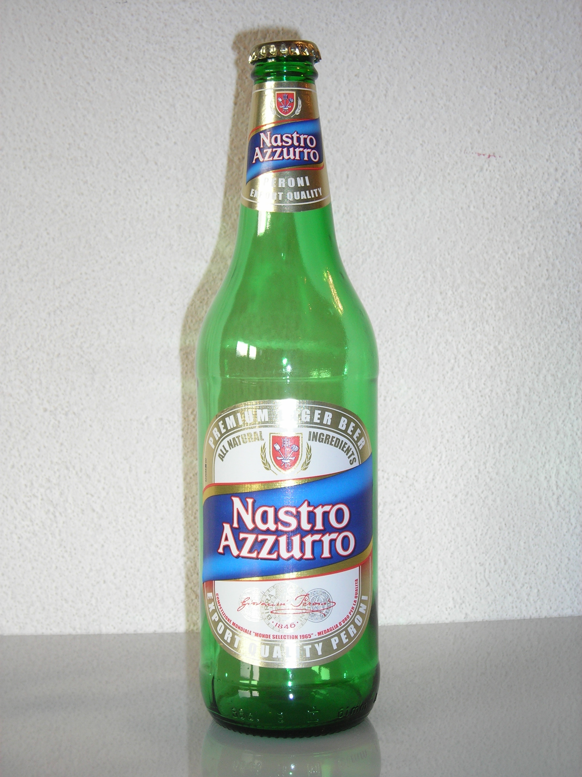 Bottiglia di birra Nastro Azzurro Export